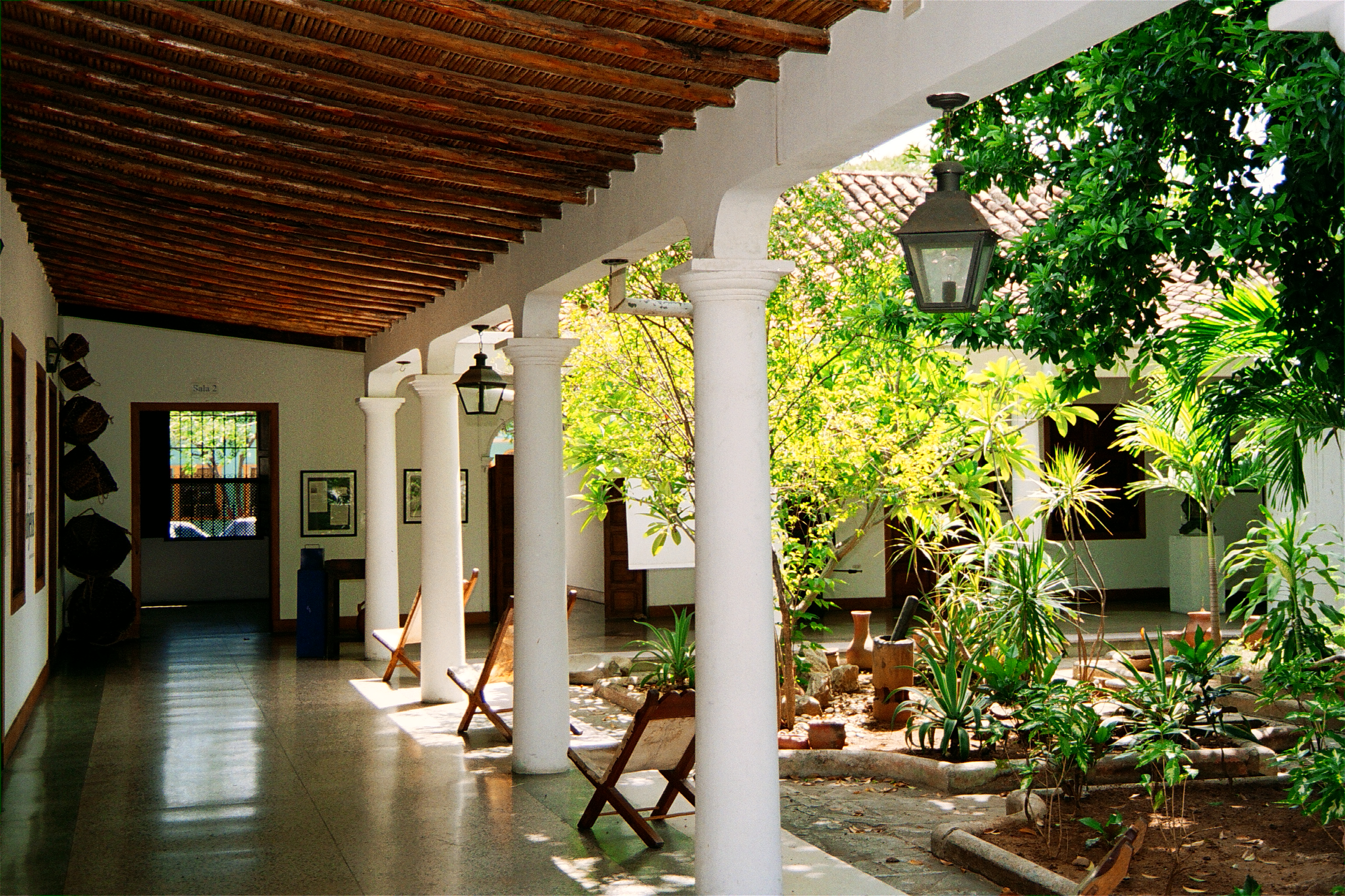 Museo del hombre Insular, isla de Margarita, Nueva Esparta